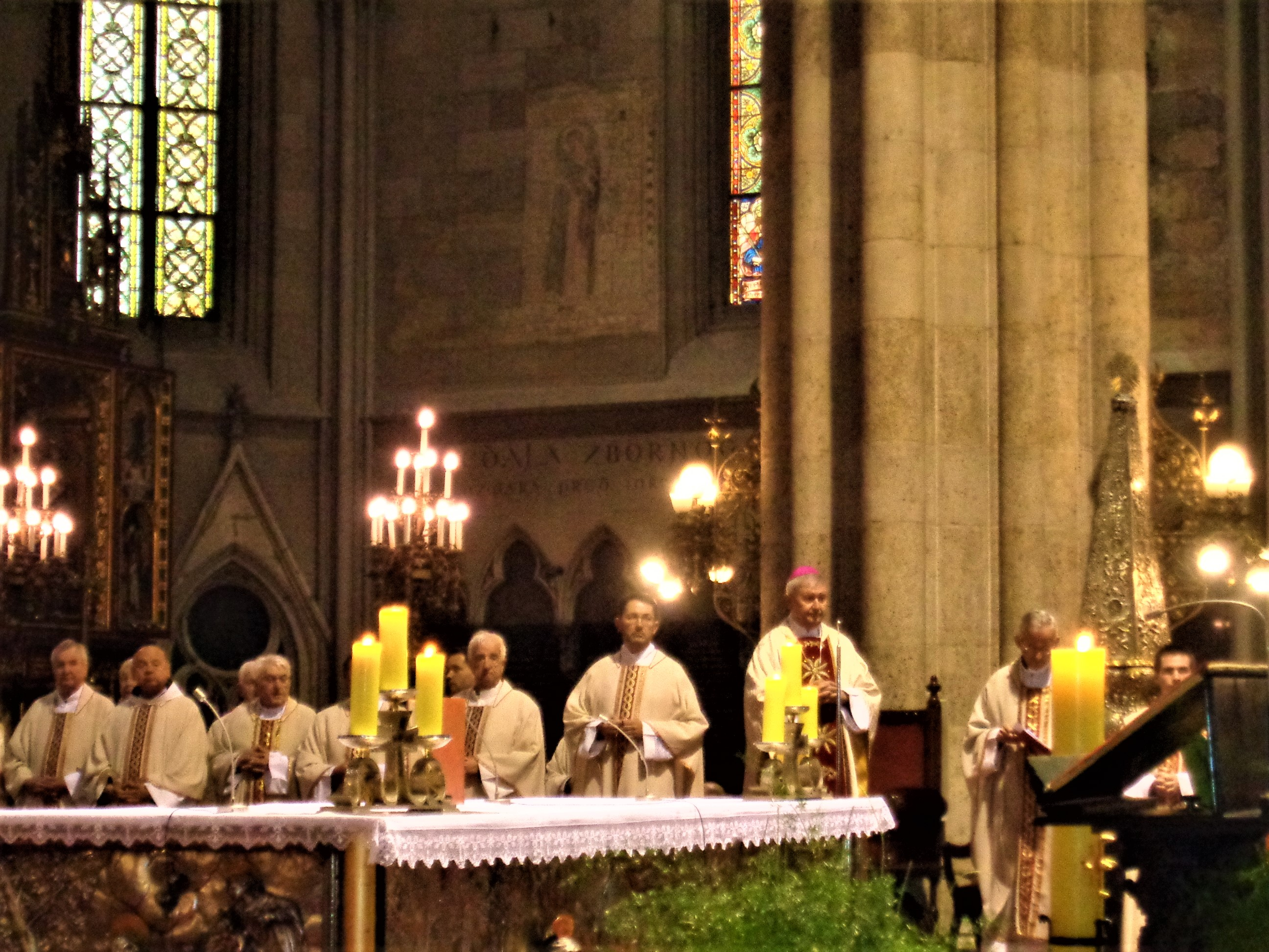 Sveta misa u Zagrebačkoj katedrali prigodom 100-te obljetnice povratka posmrtnih ostataka Petra Zrinskog i Frana Krsta Frankopana u Hrvatsku 1919. g.